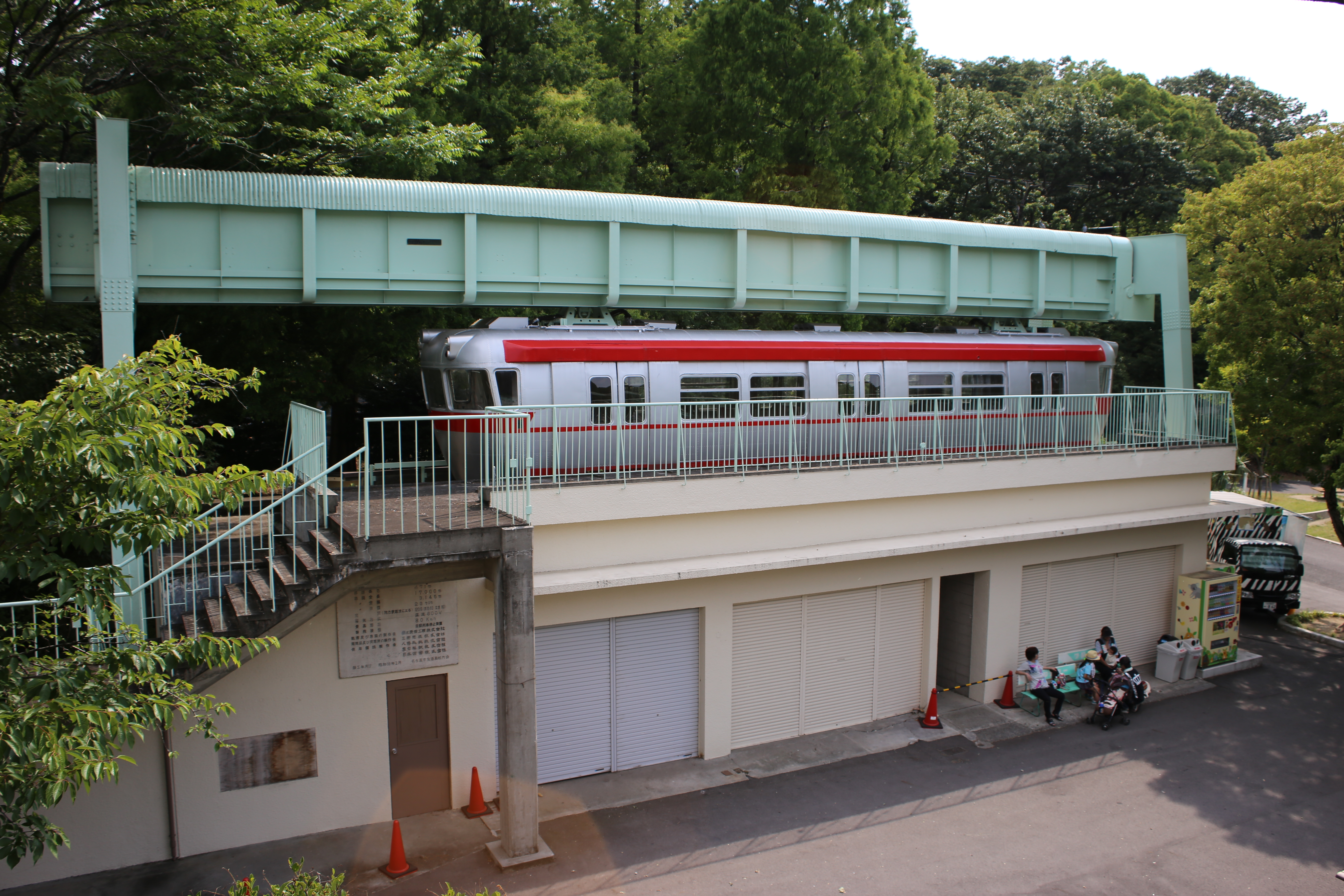 名古屋市千種区の名古屋市東山動植物園内に残されるモノレール駅の跡地と当時使用されていたモノレール